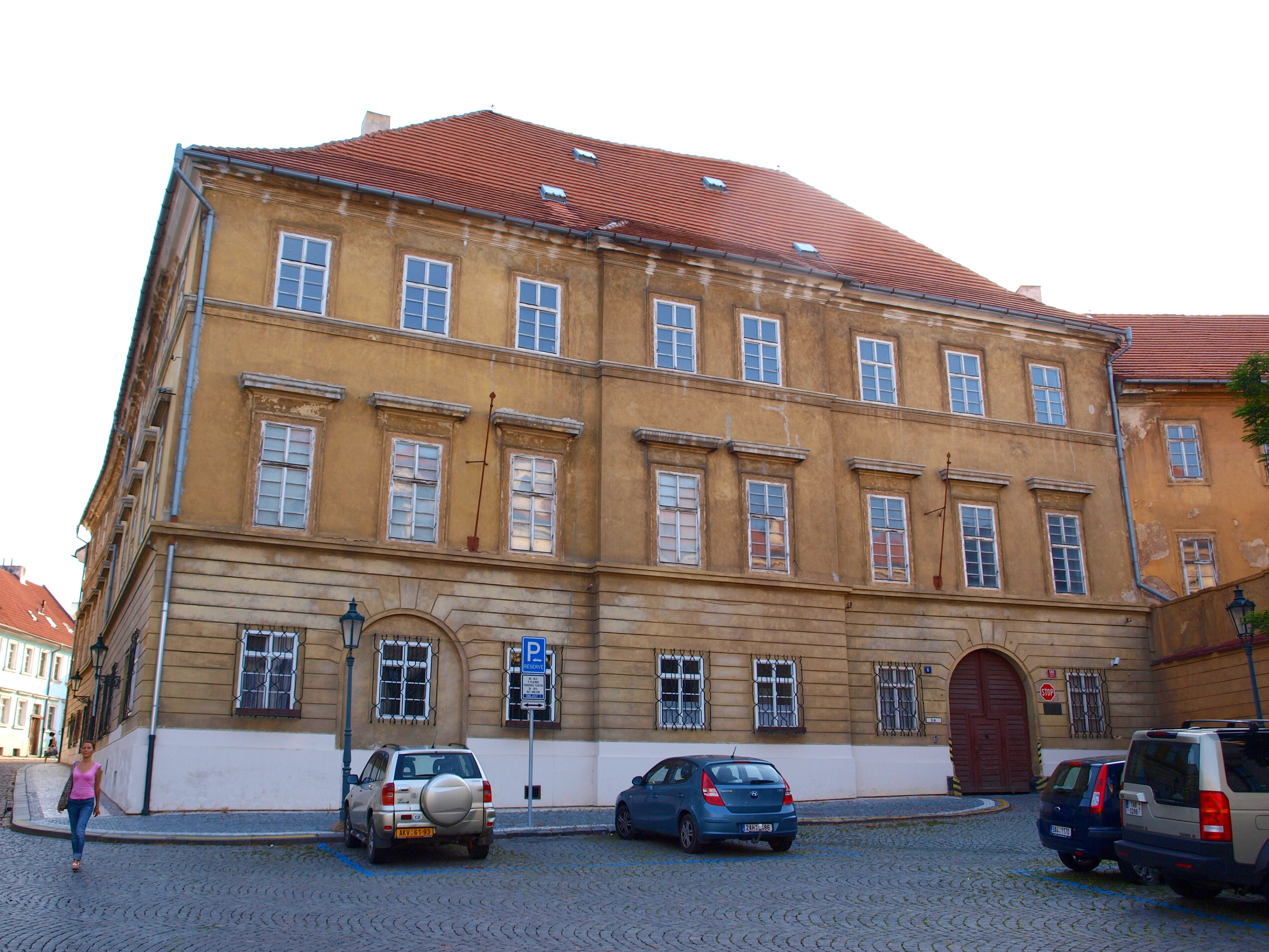 Trautmannsdorffský (Trčkův) palác